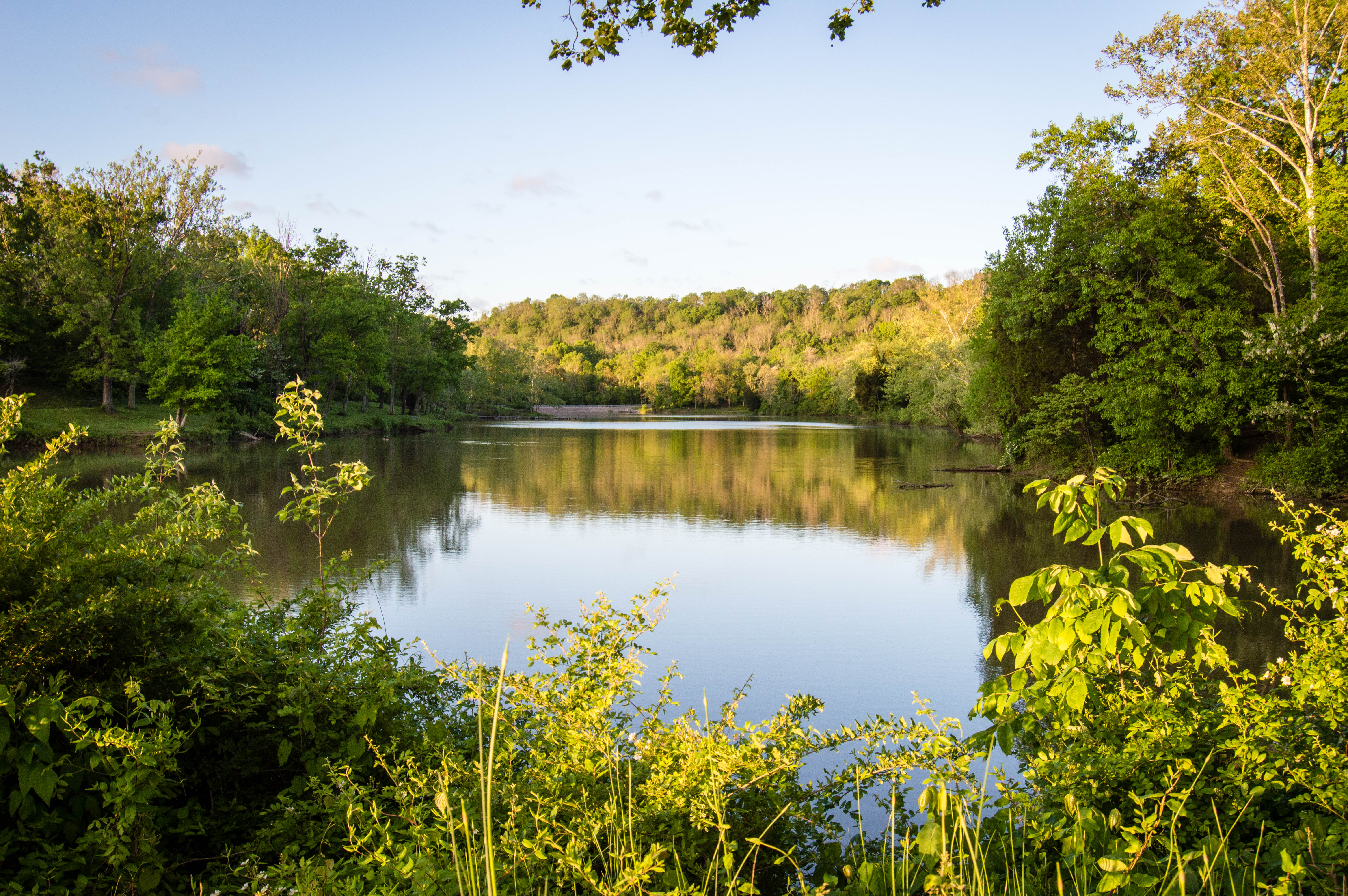 General Butler